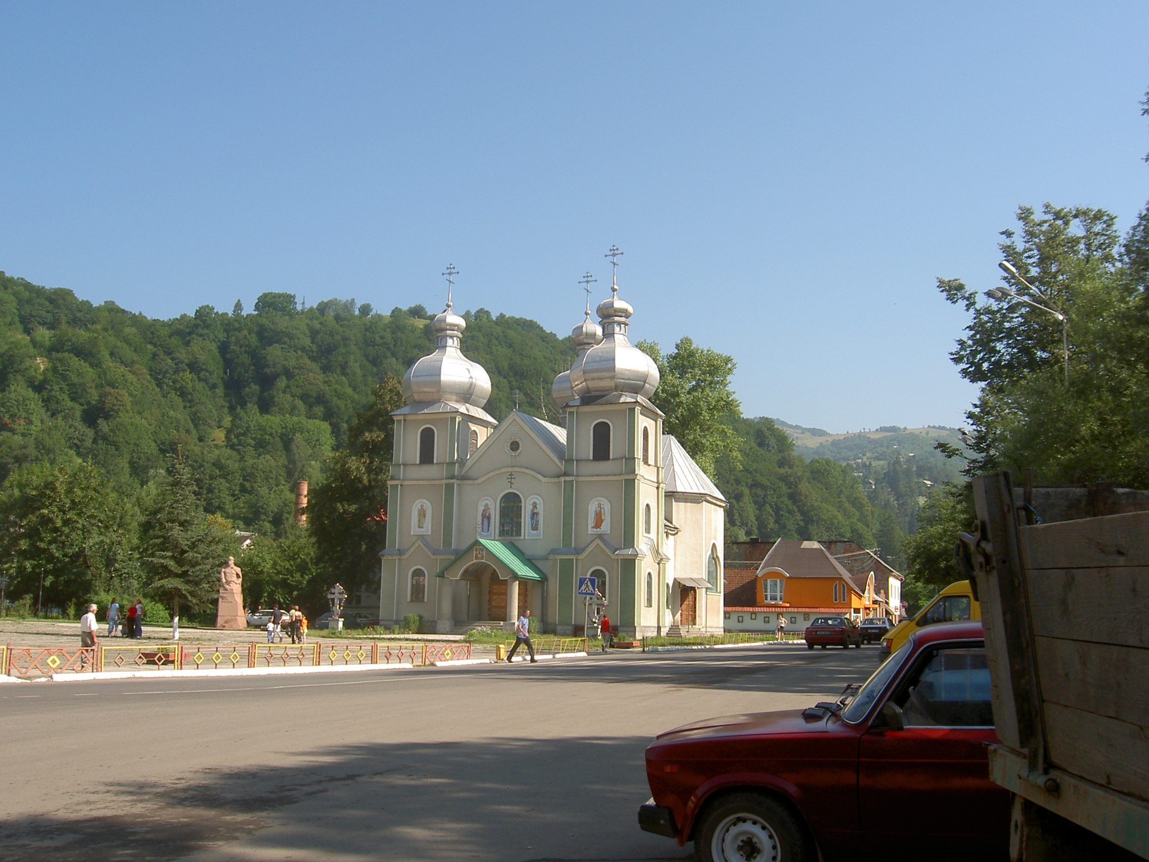 Kostel v Rachově